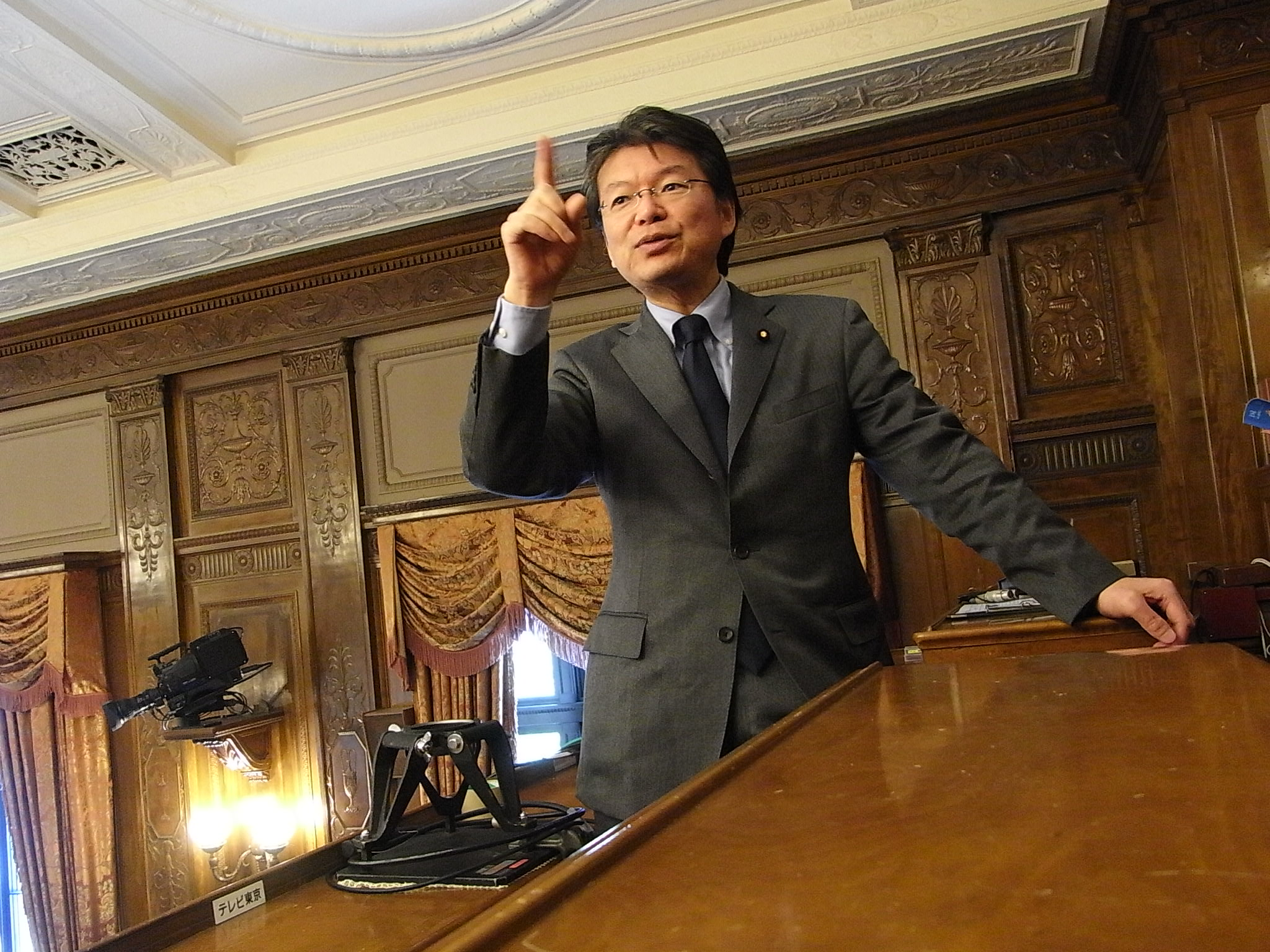 衆議院第一委員会室での長妻昭（2009年3月撮影）